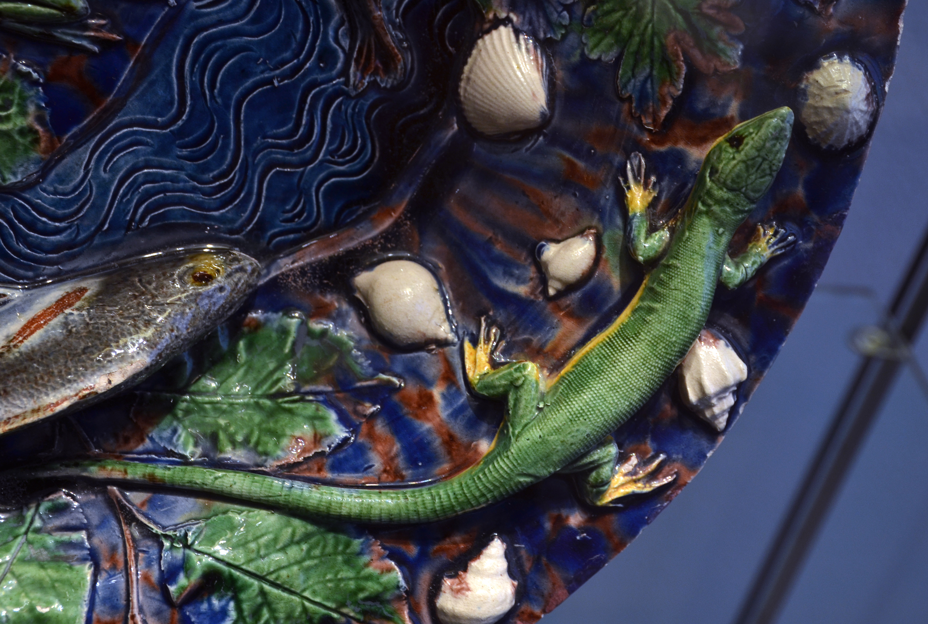 Plat par Bernard Palissy, faïence, Paris 1550 : détail. Museum für Angewandte Kunst à Cologne ( Köln ).